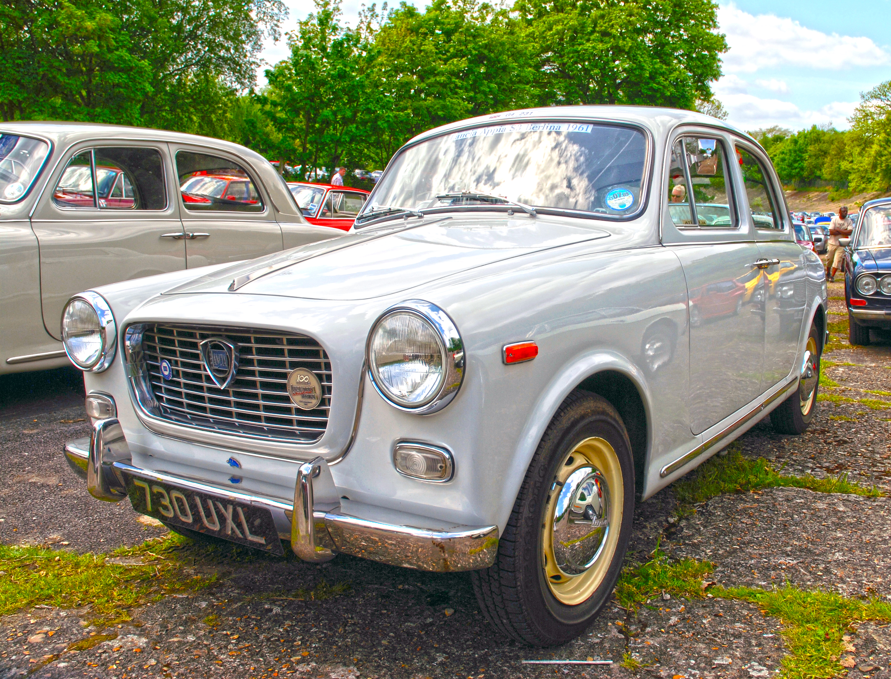 Auto Italia,May 2009